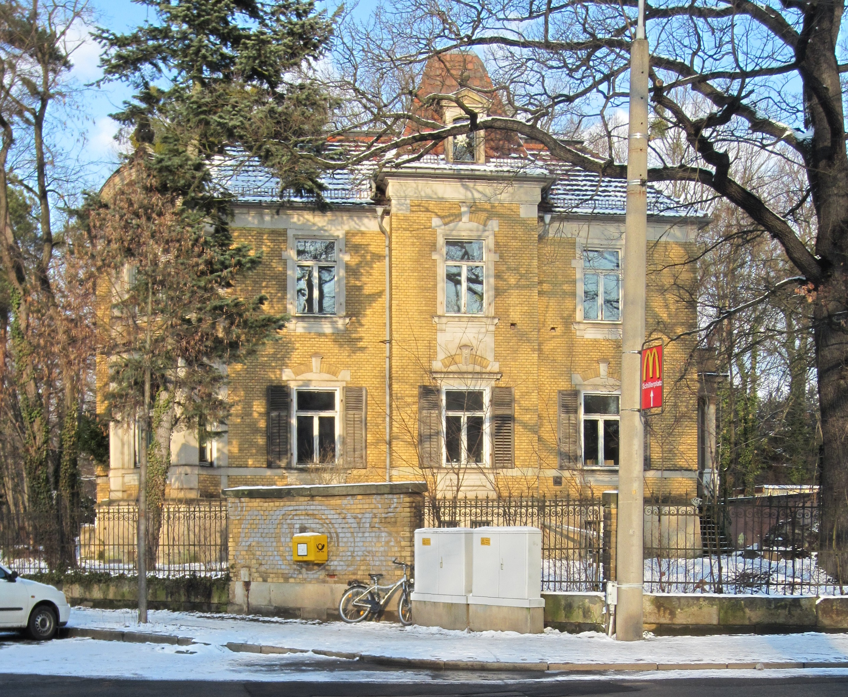 Denkmalgeschützte Villa in Blasewitz (Dresden), Lothringer Weg 3